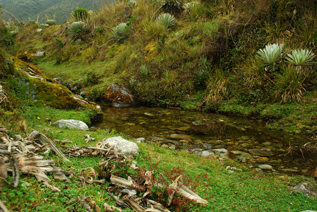 Riachuelo en el Páramo La Culata, estado Mérida.